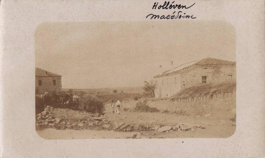 Олевени през Първата световна война.